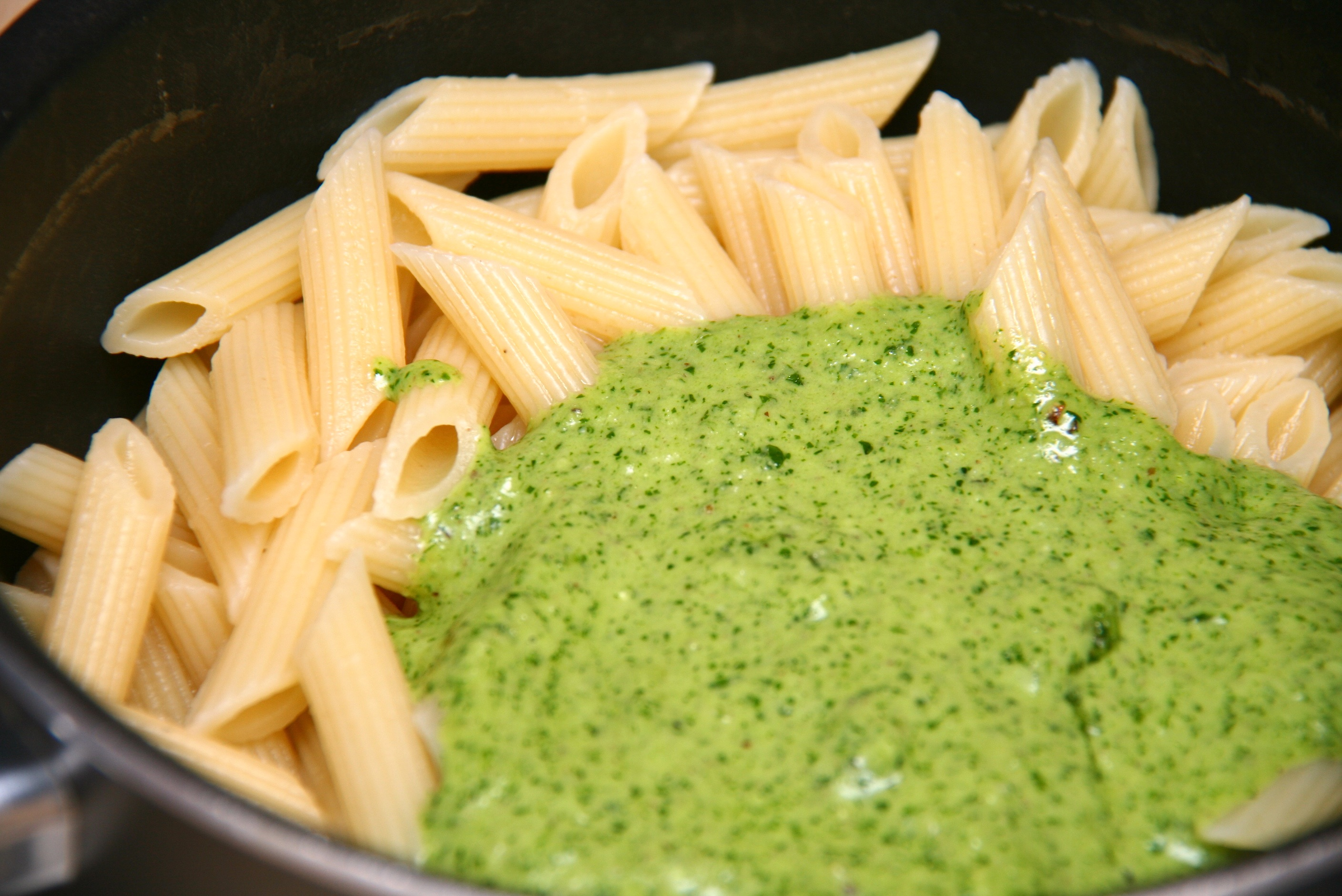 Petersilien-Pesto Rezept hier